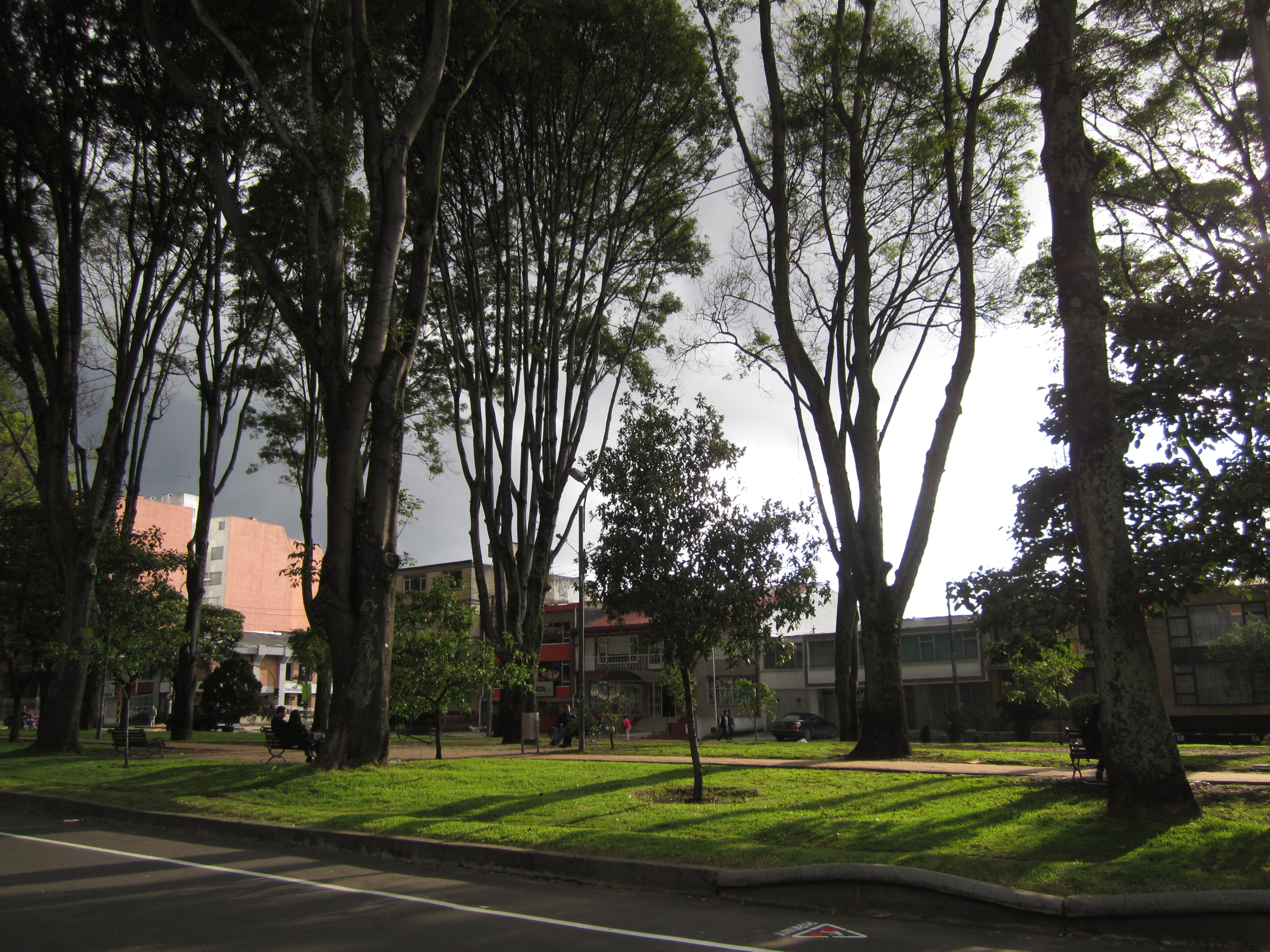 Bogotá Parkway con calle 39.